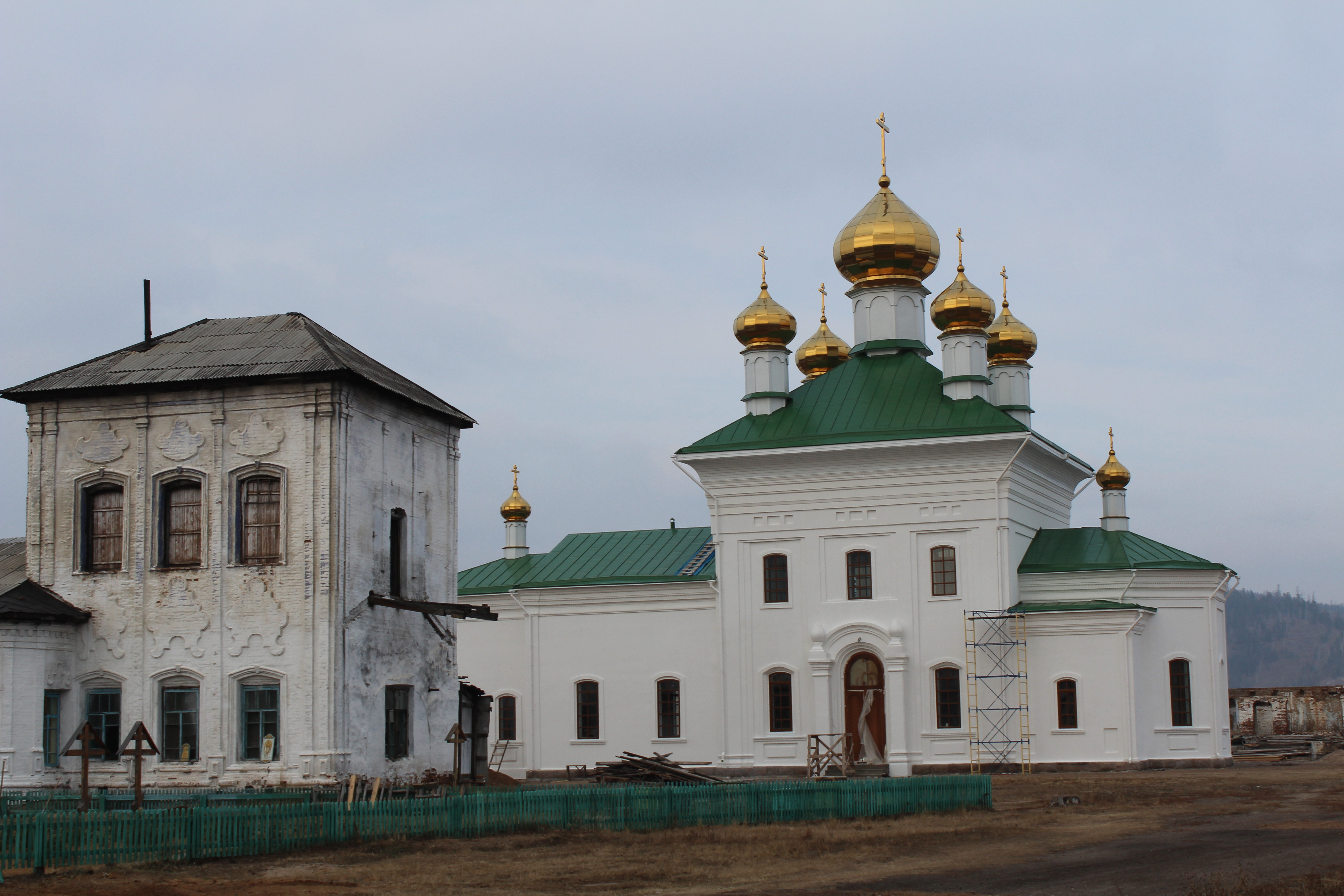 Монастырь на реконструкции